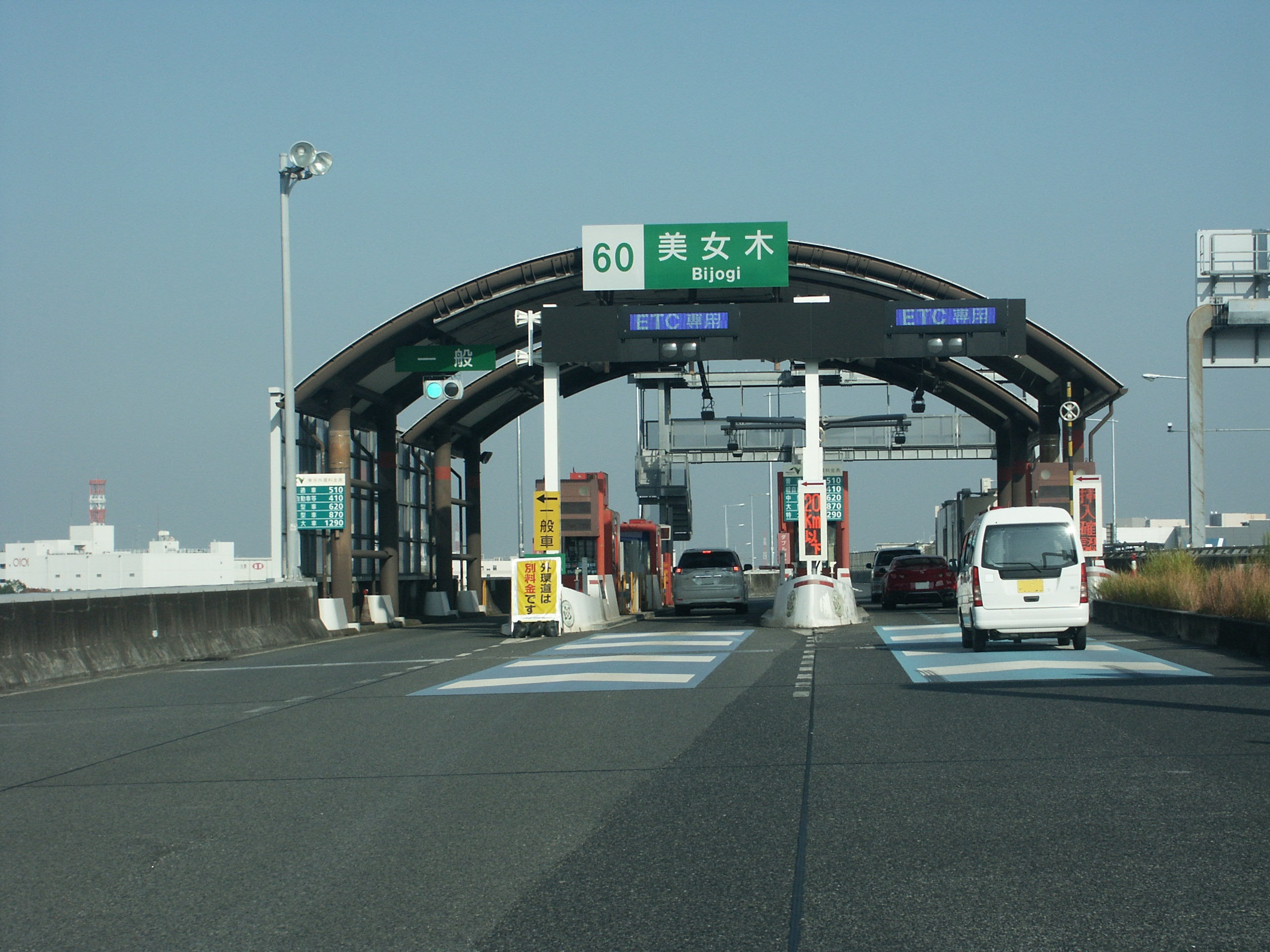 東京外環自動車道美女木JCT料金所（外回り川口JCT側料金所）